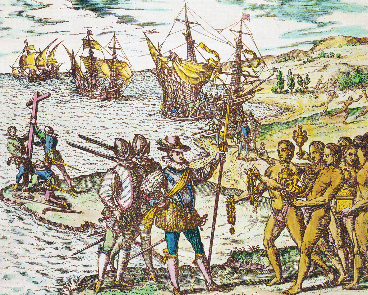 Colomb prend possession des Amériques-gravure de Théodore de Bry extraite de Americae Tertia Pars